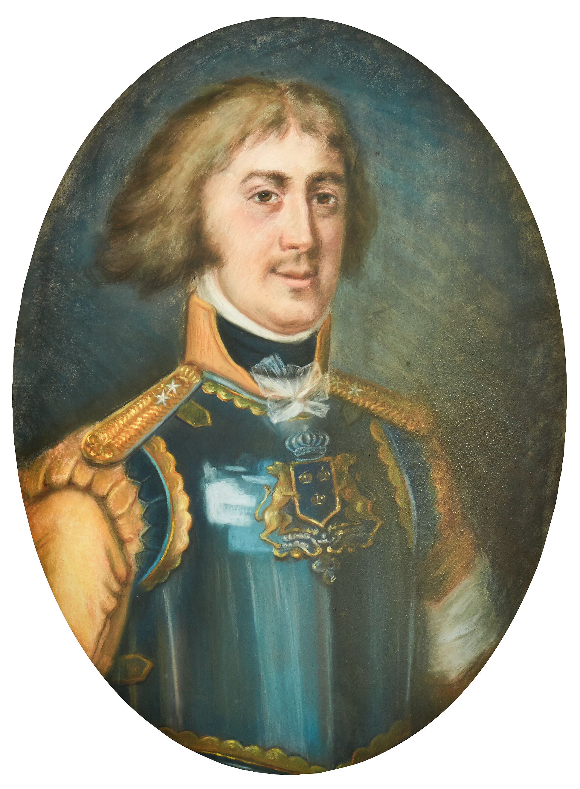 Johan Wilhelm Liljencrantz (1768-1816) iklädd uniform med epåletter för en ryttmästare vid Livregementet till häst. Avporträtterad ca 1795 av Jonas Forsslund.